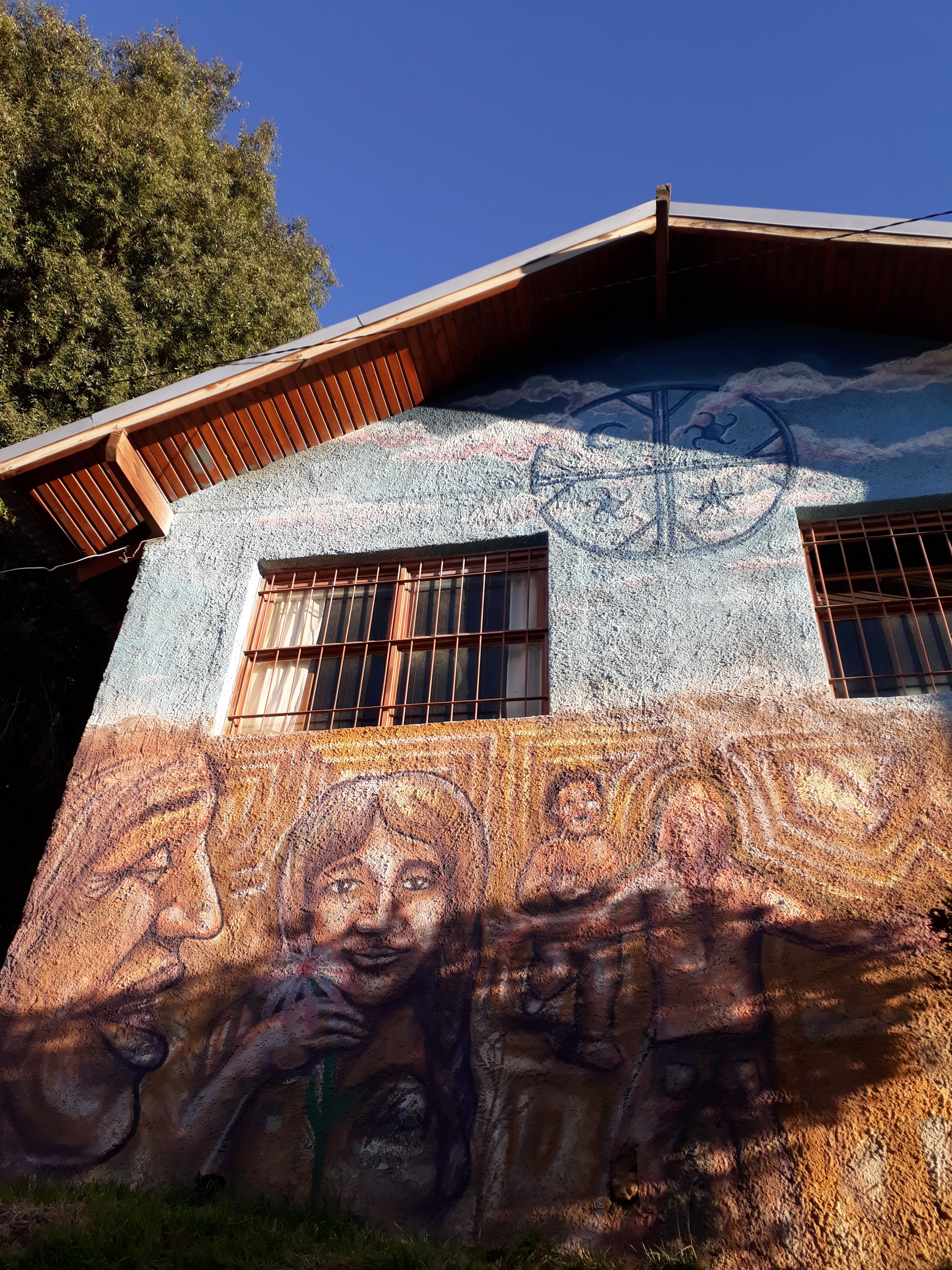 Mural relizado en una de las paredes del colegio Amuyen, perteneciente a la Fundación Gente Nueva, en San Carlos de Bariloche, Río Negro, Argentina. El mismo representa a los Pueblos Originarios de la Patagonia y uno de sus simbolos mas representativos, el cultrún.